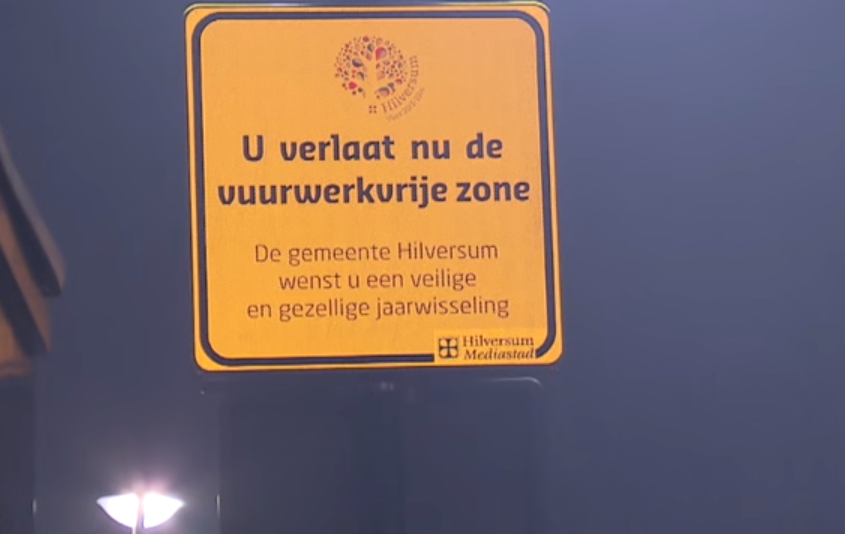 Bord dat het einde van de vuurwerkvrije zone in het centrum van Hilversum markeert.